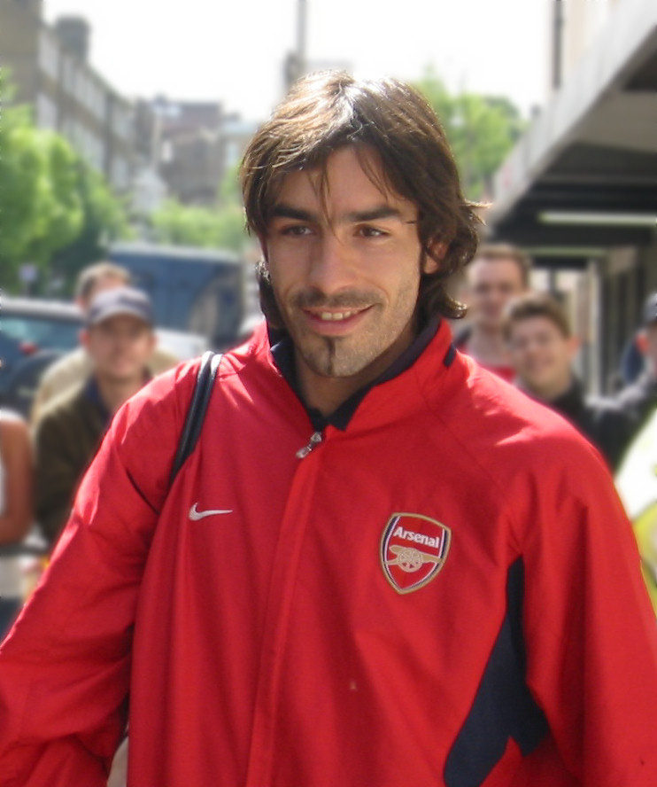 arsenal playerRobert Pirès